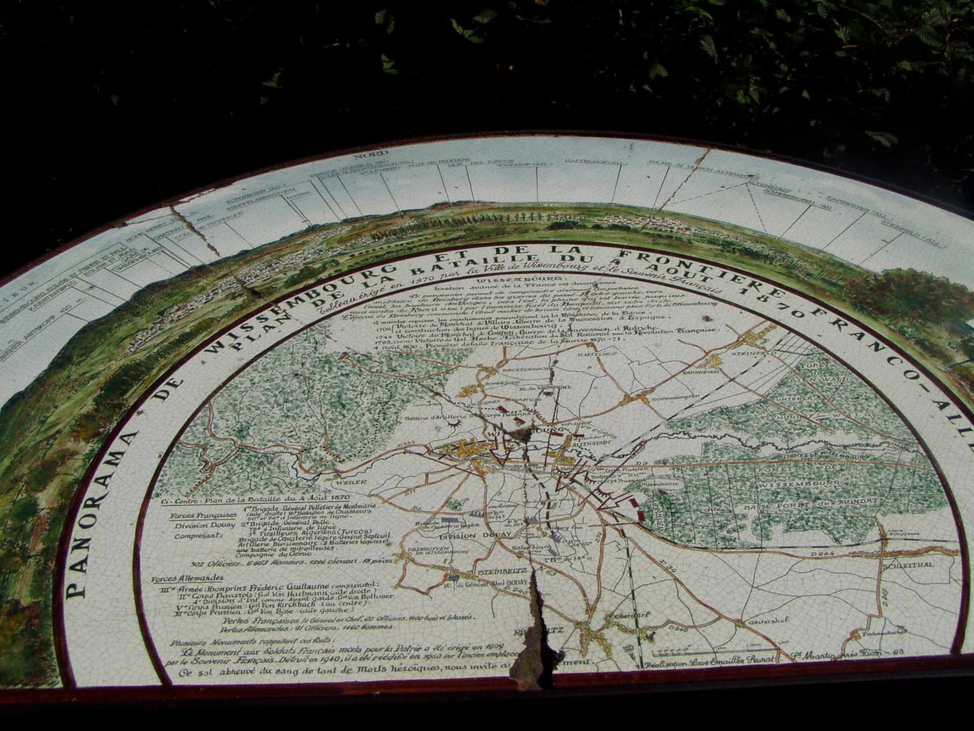 Gedenkplatte am Obelisk auf dem Gaisberg bei Weißenburg/Wissembourg an die Schlacht von Weißenburg